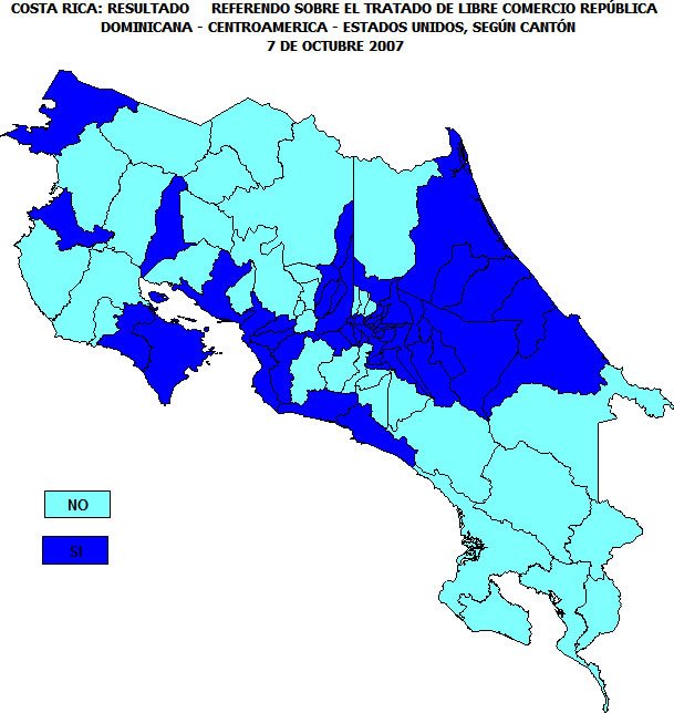 Resultados Refeéndum Costa Rica 2007 sobre TLC